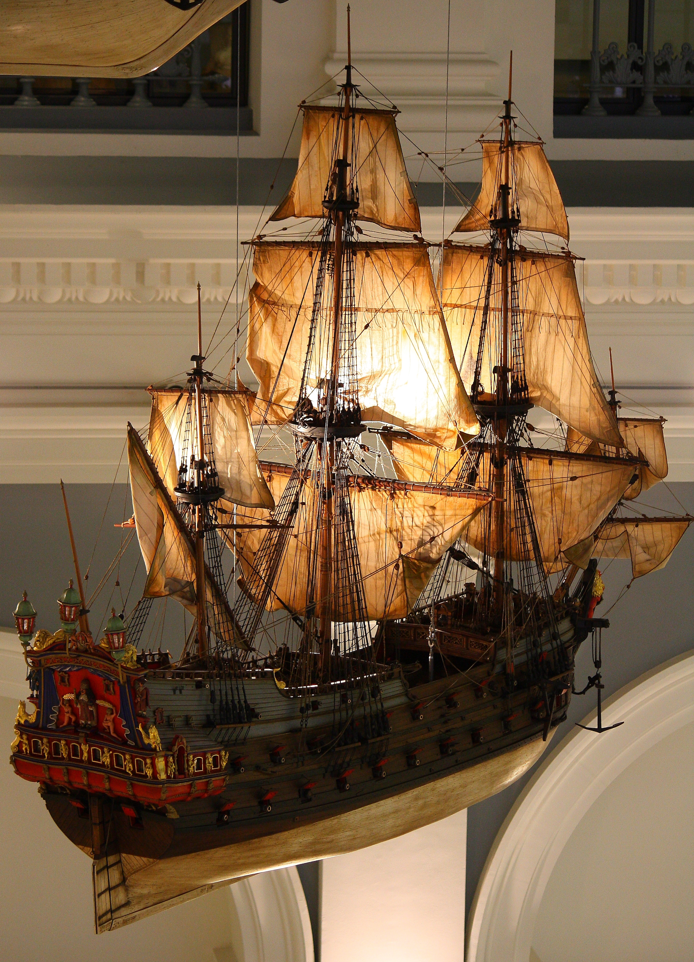 Modell des hamburgischen Konvoischiffes Leopoldus Primus - totale Heckspiegelansicht